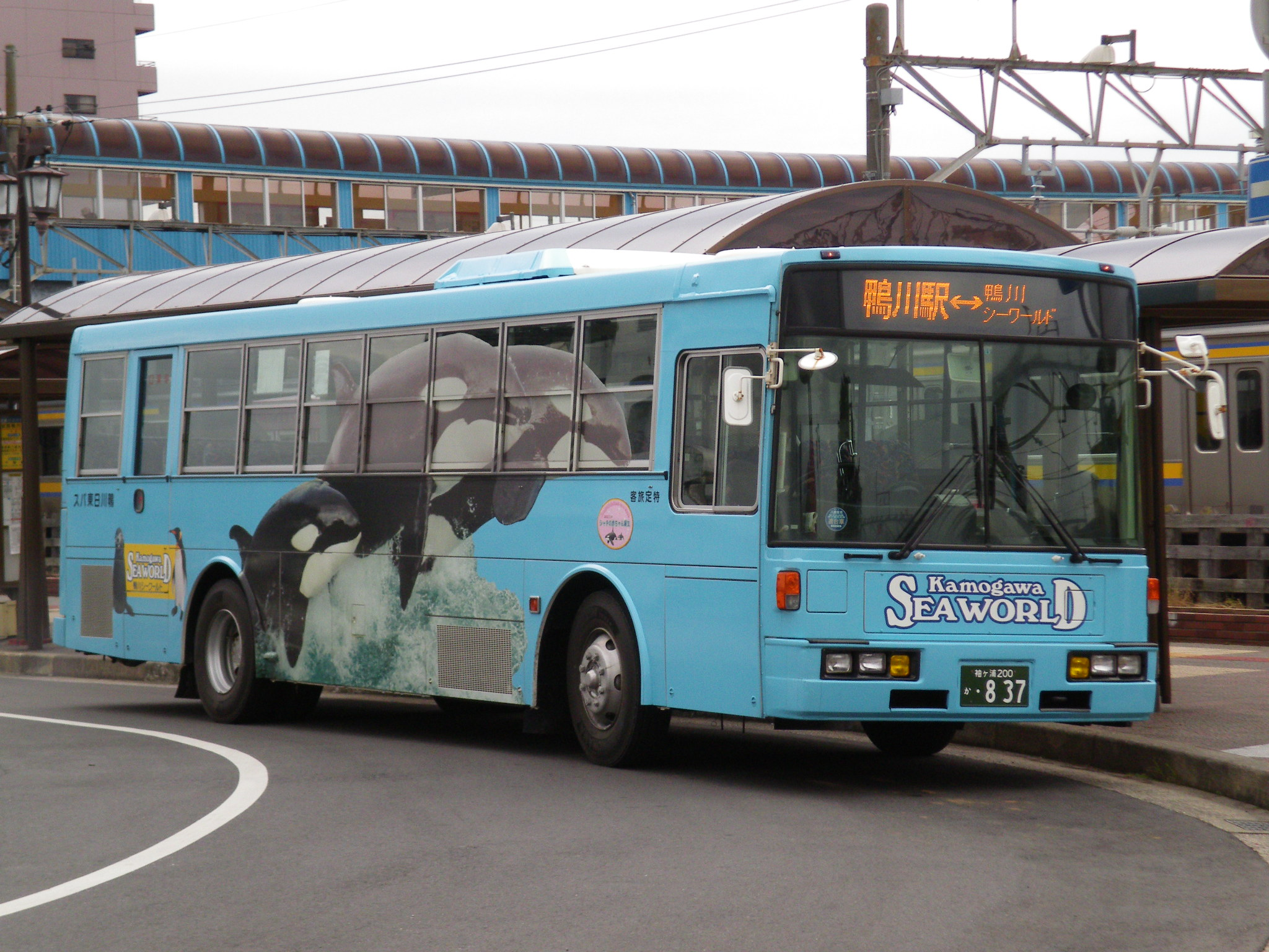 日産ディーゼル・UA 袖ケ浦200か837 千葉県鴨川市・JR安房鴨川駅西口にて投稿者本人が撮影。